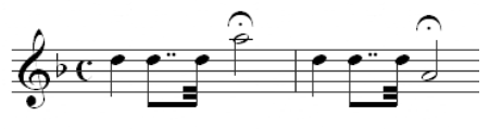 Openingsthema Symfonie N° 104, J. Haydn